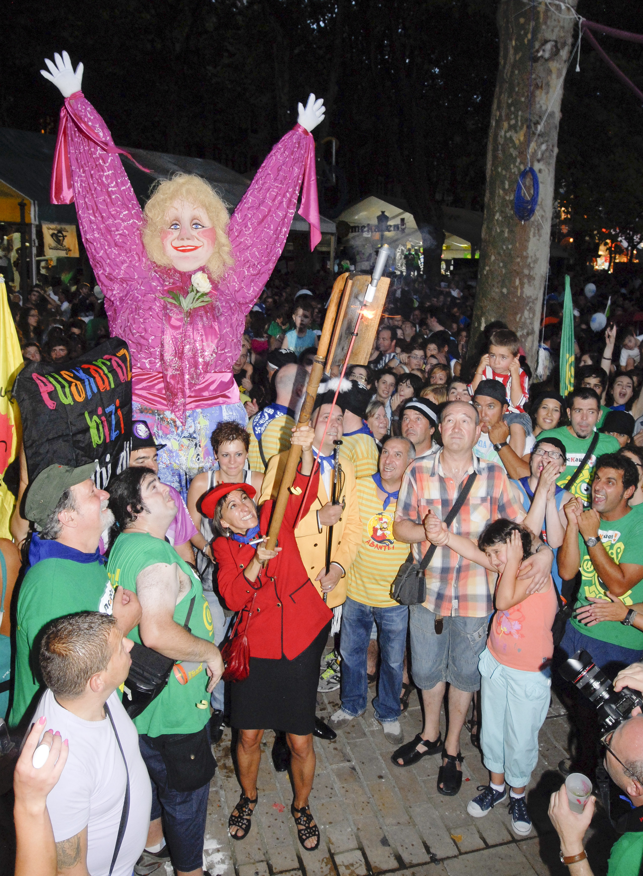 Larunbata20-100